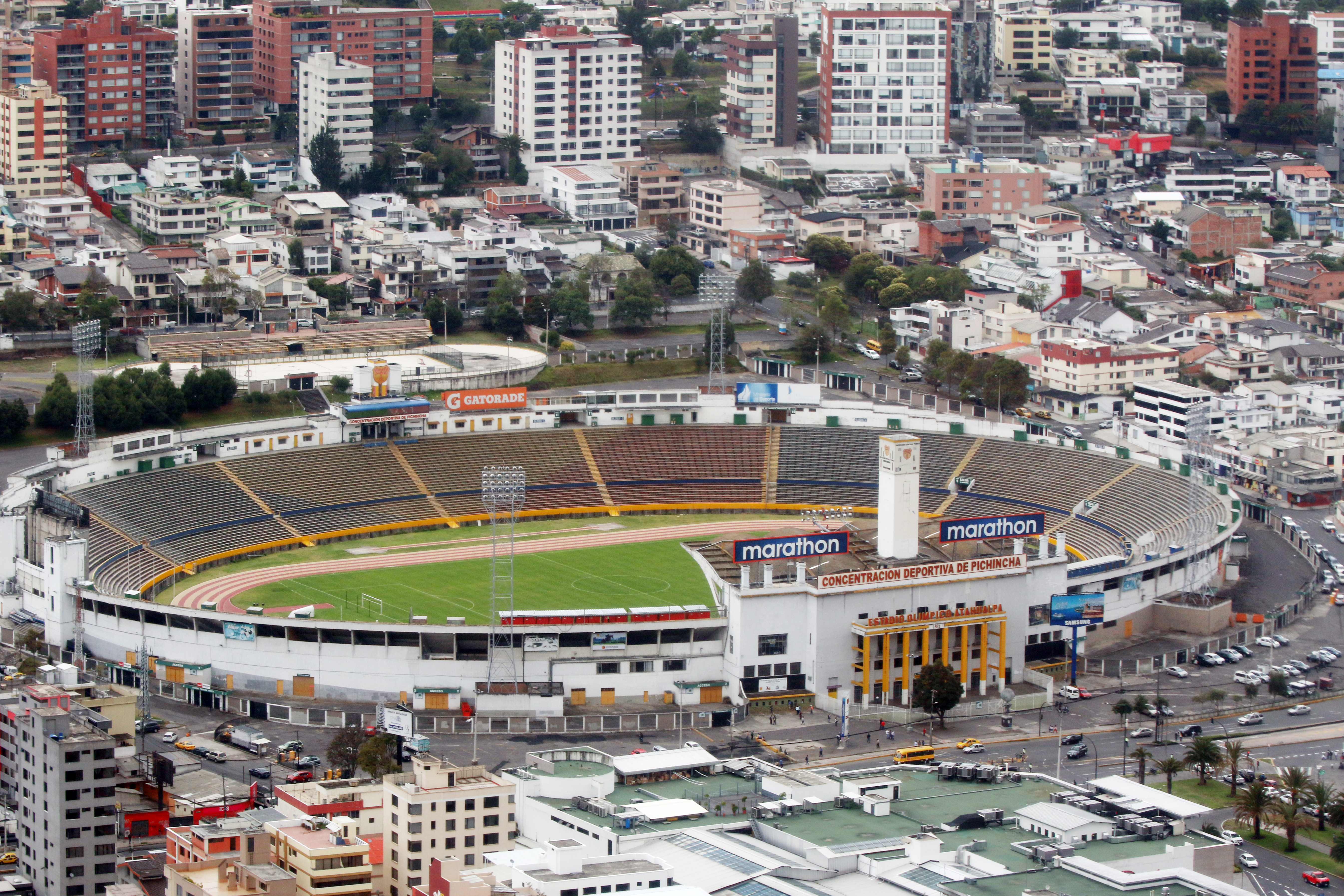 Quito, 13 de octubre de 2017 (Andes).- Conocer Quito desde las alturas es una sensación difícil de describir. Ciudad mágica, llena de contrastes nos muestra otra mirada desde su increíble cielo azul; su arquitectura; sus Plazas y Parques han convertido a la ciudad en una de las más hermosas de América Latina. ANDES/Micaela Ayala V.